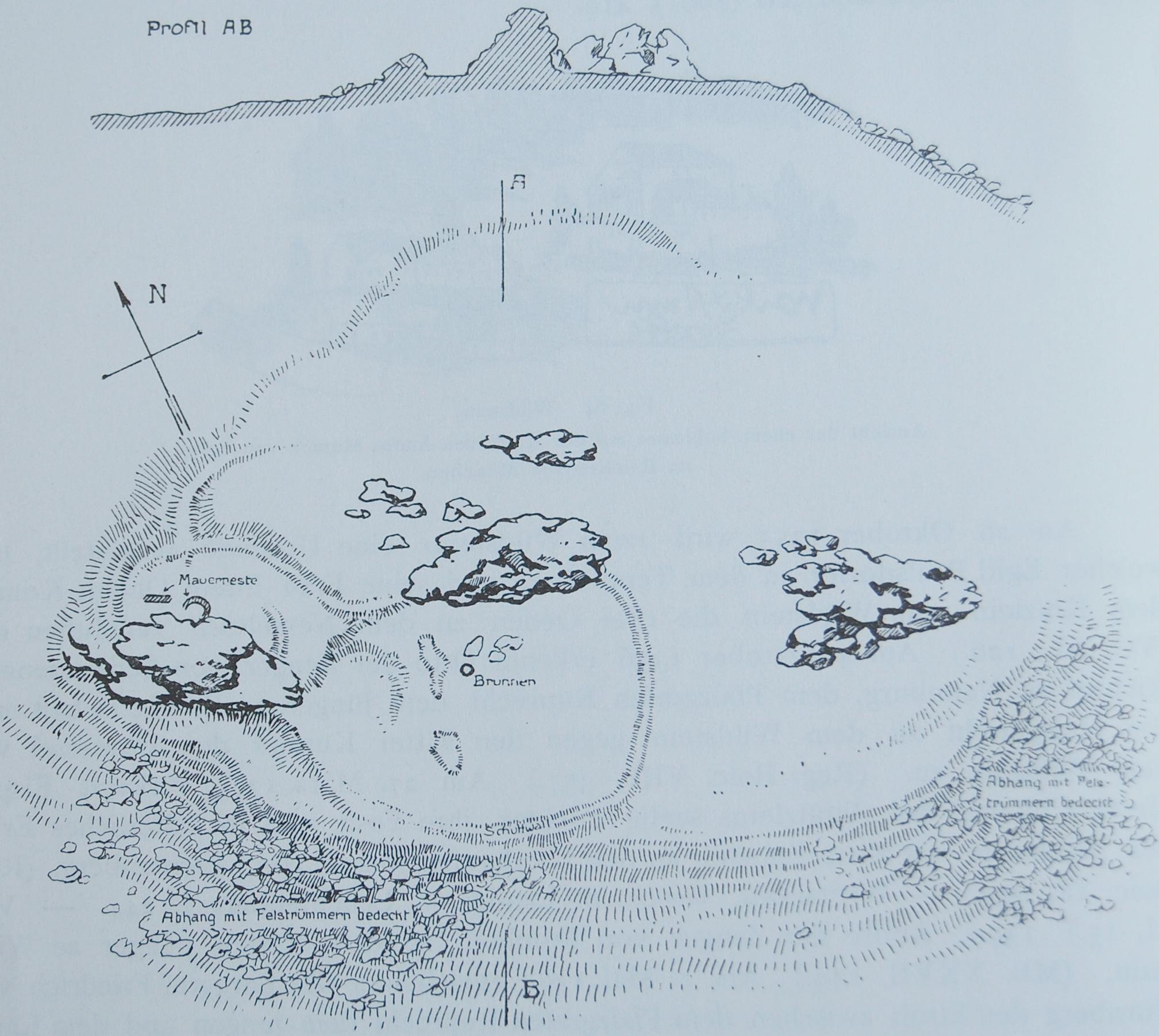 Grundriss des Burgstalls Wildstein aus dem Jahre 1906